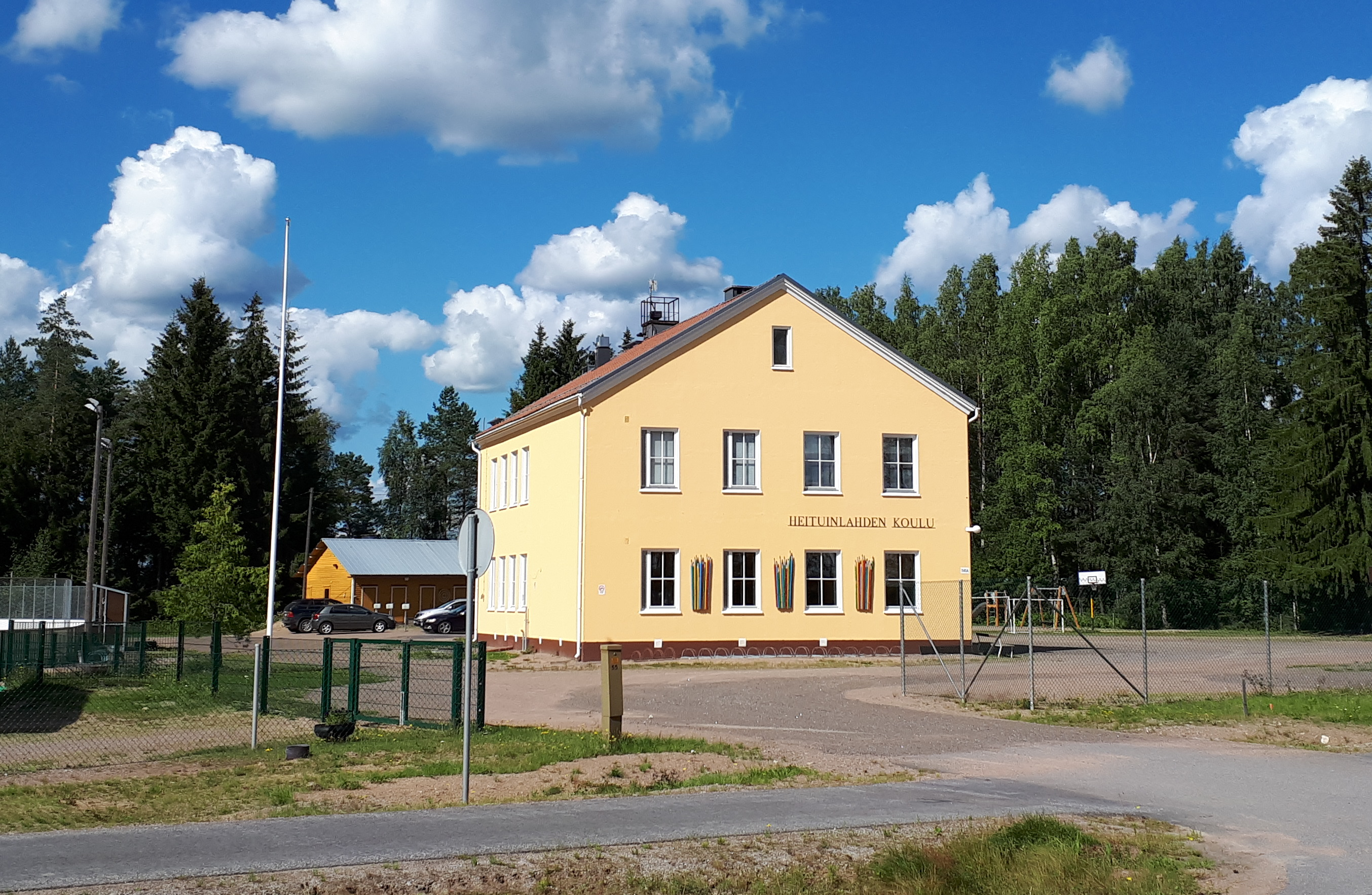 Heituinlahden koulu Savitaipaleella